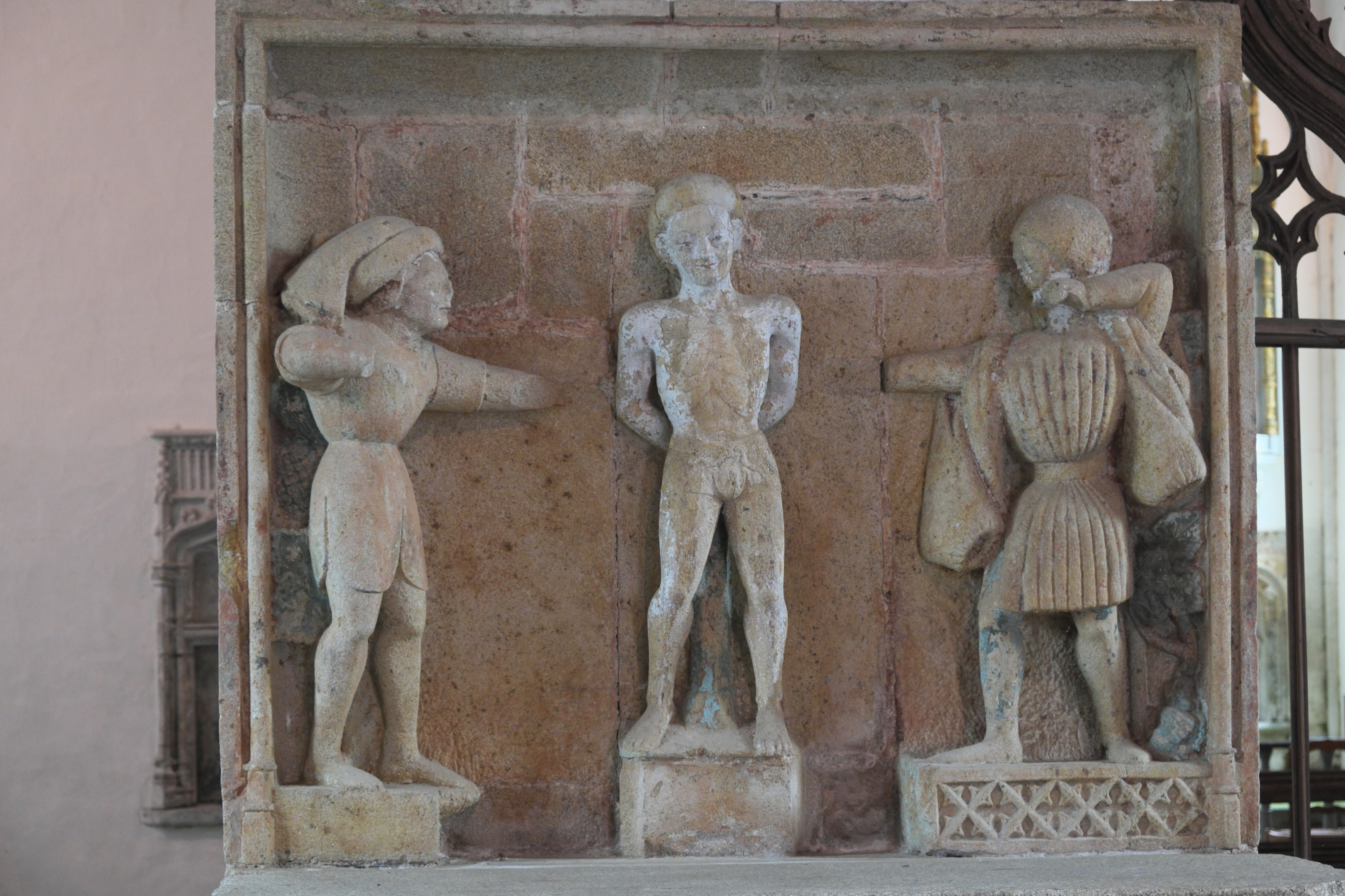 Kapelle Saint-Fiacre in Le Faouët im Département Morbihan (Region Bretagne/Frankreich), Martyrium de heiligen Sebastian, Granit-Retabel aus dem 15. Jahrhundert